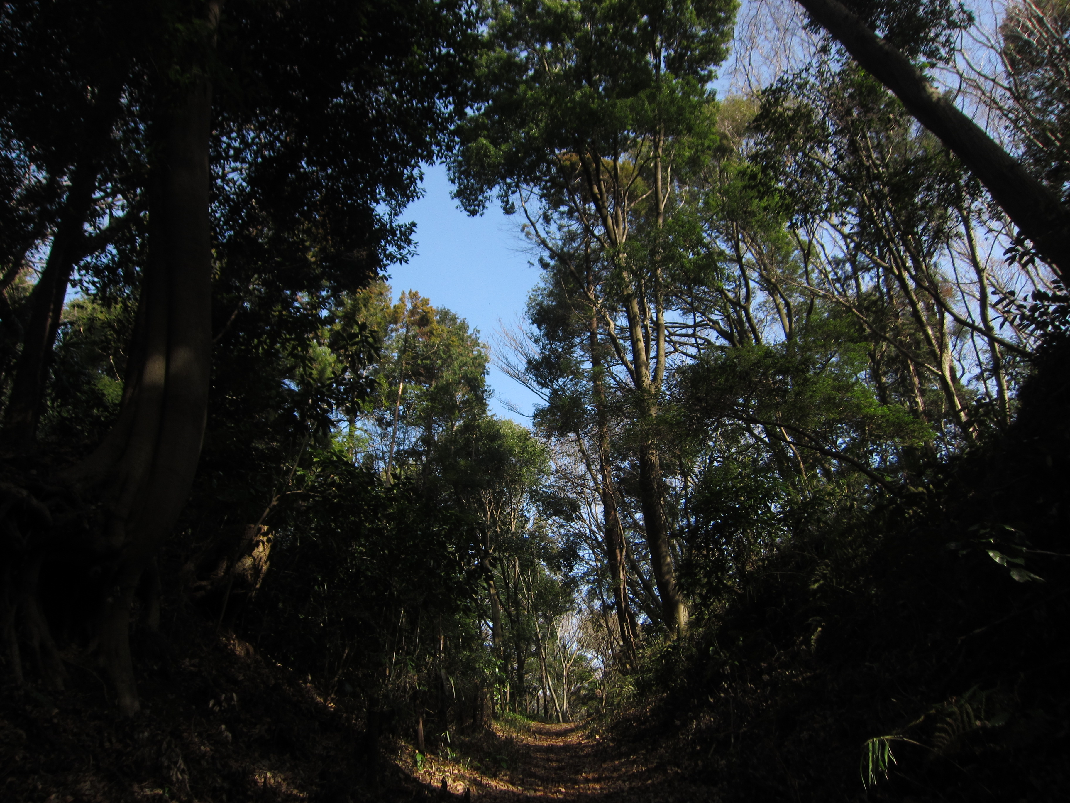 座間谷戸山公園を通る星の谷街道・巡礼街道